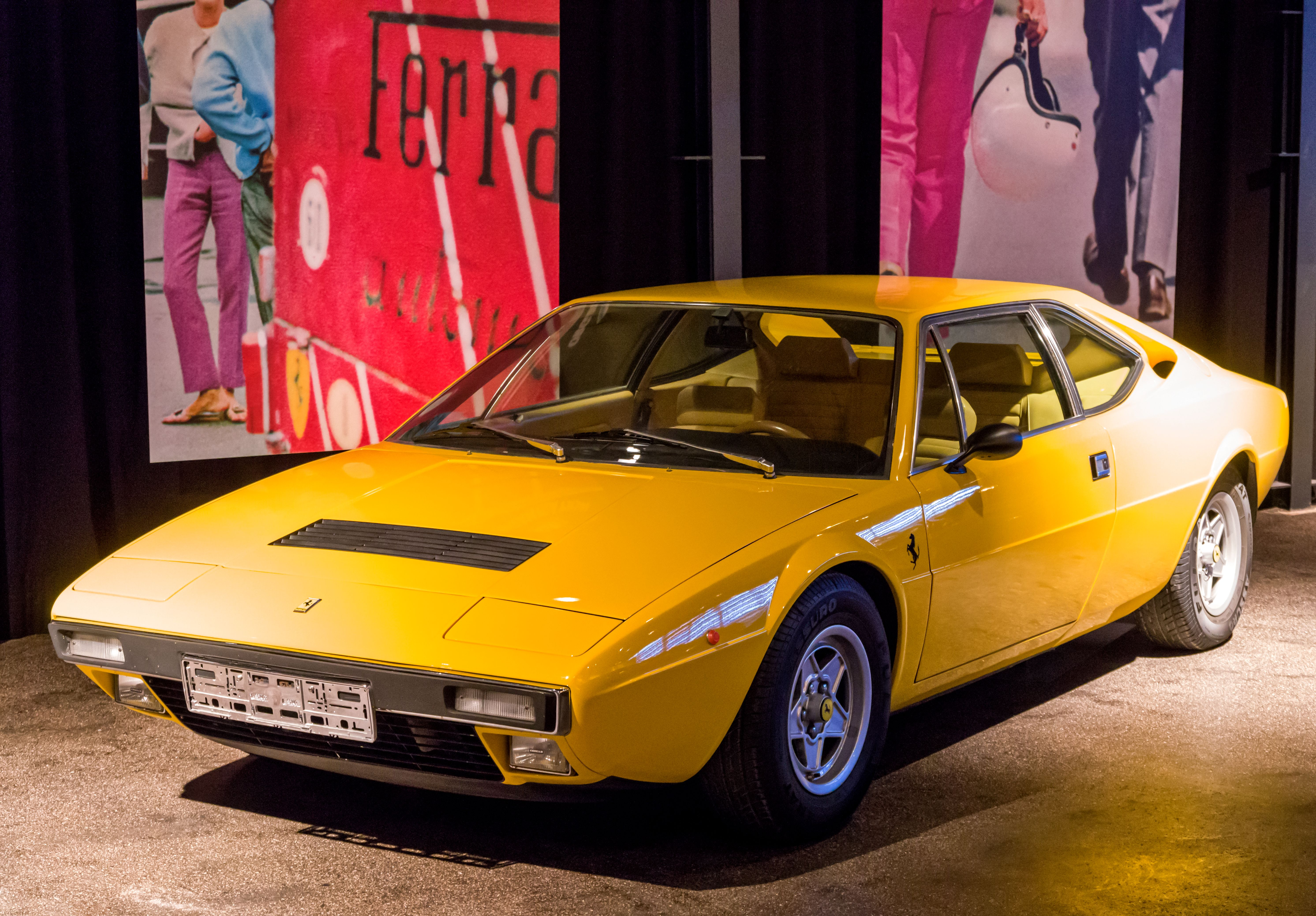 Das Volante Oldtimermuseum in Kirchzarten